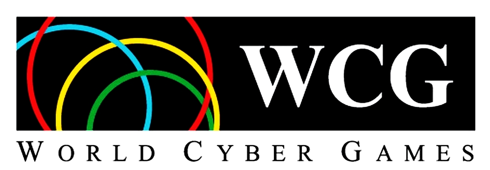 Logo der World Cyber Games